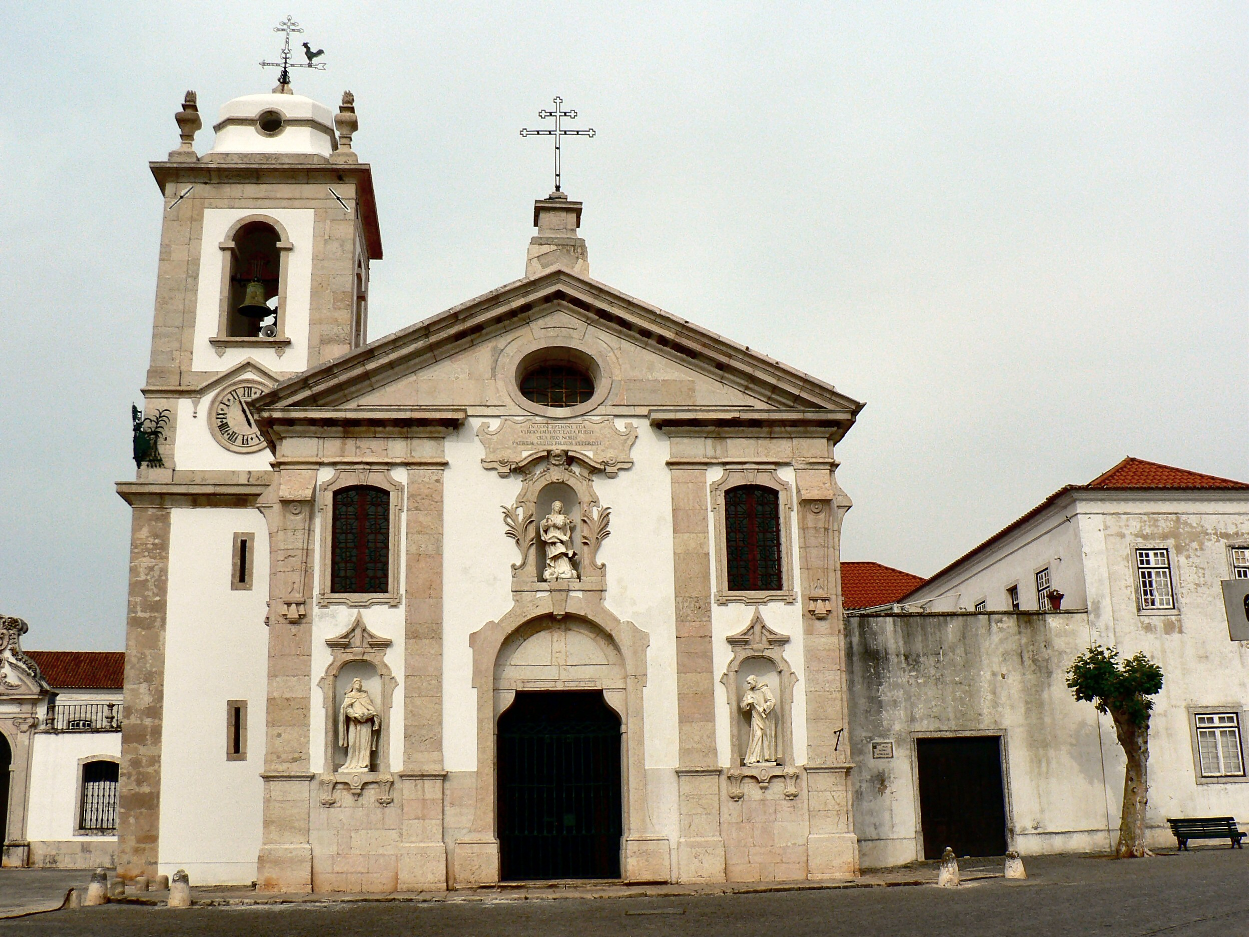 Igreja Matriz de Santo Antão do Tojal